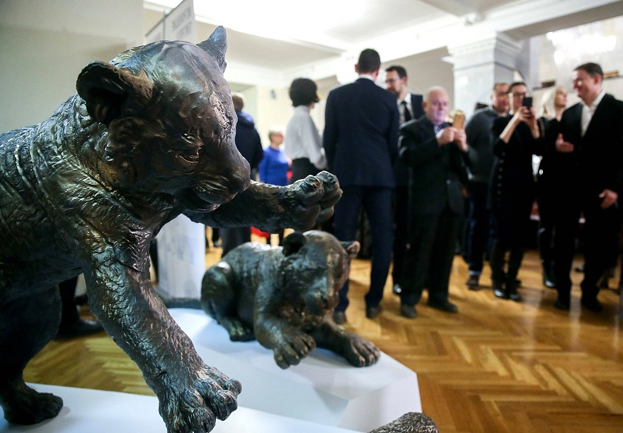 Выставка «Амурский тигр»